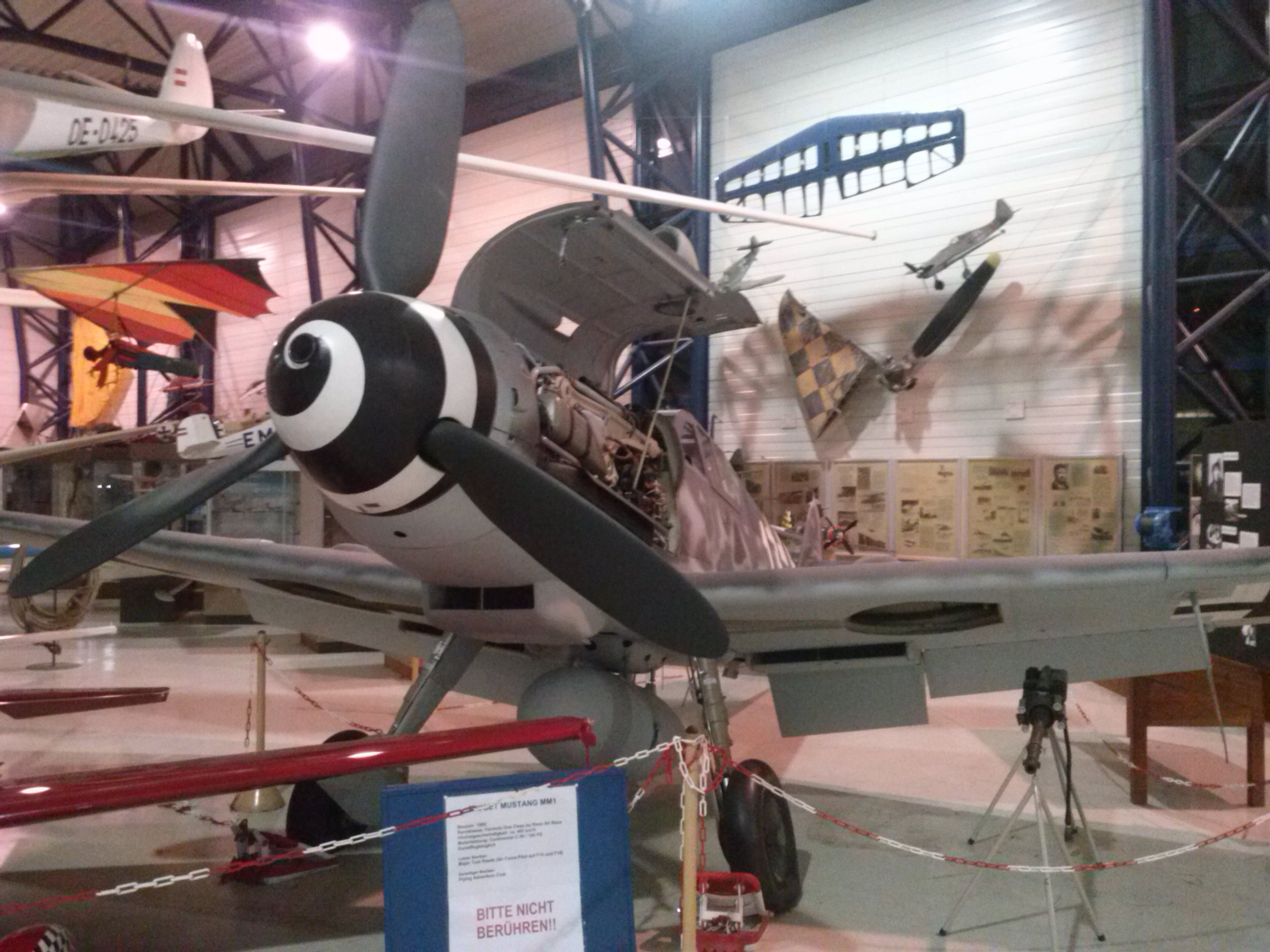 Messerschmidt Bf 109 Nachbau mit Originalteilen, teilweise mit Teilen eines abgestürzten Flugzeuges der Jagdgeschwaders 54